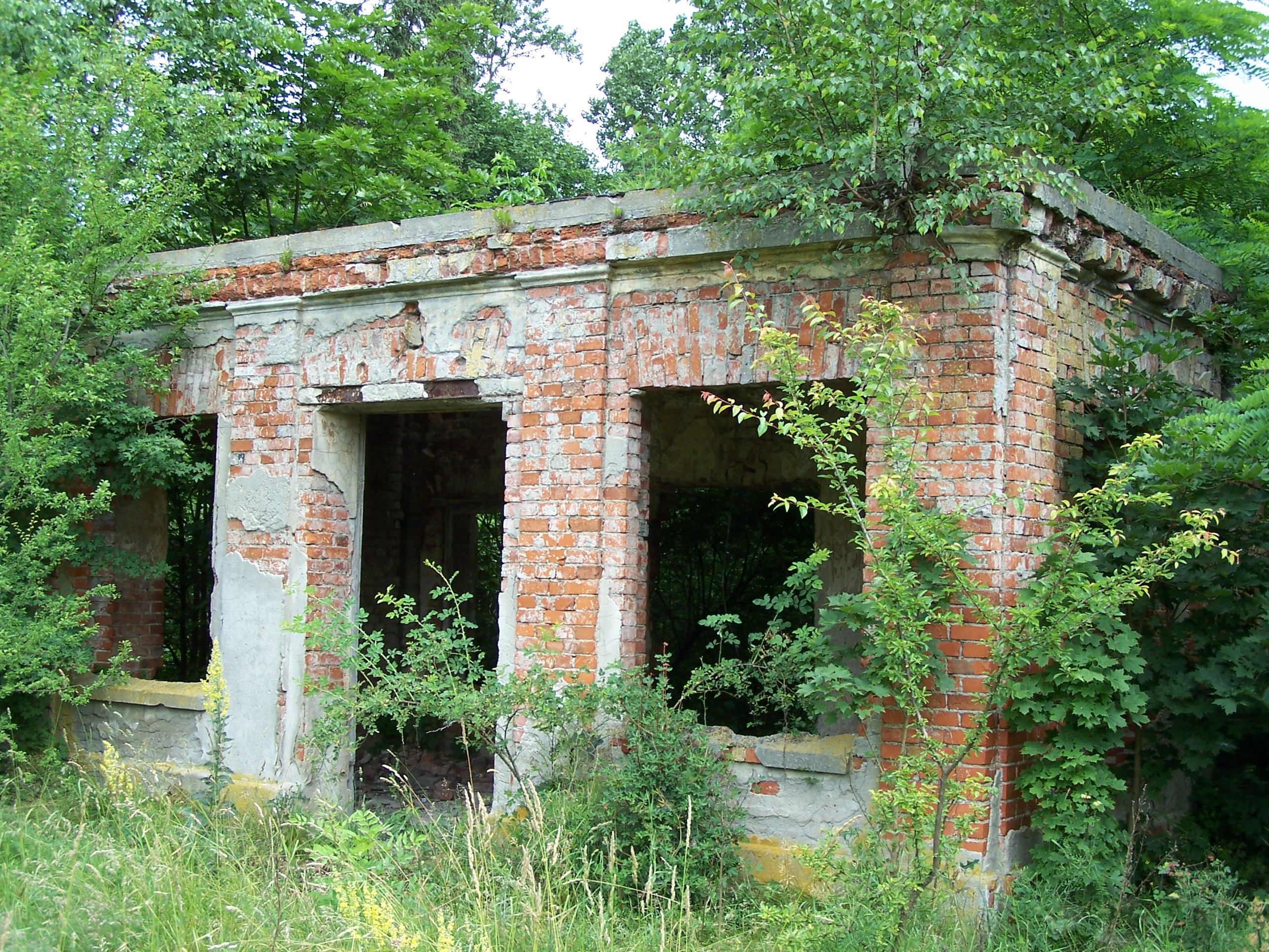 Polska, Lutynia, woj. wielkopolskie, powiat pleszewski, gmina Dobrzyca Ruiny dworku Lutyńskiech w Lutynii